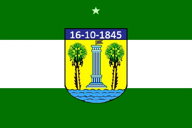 Bandeira de Assu (RN).